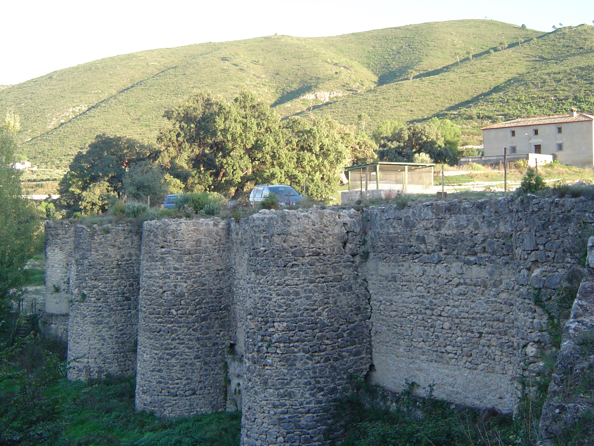 Vista del muro de contención del embalse del Bosquet en Moixent